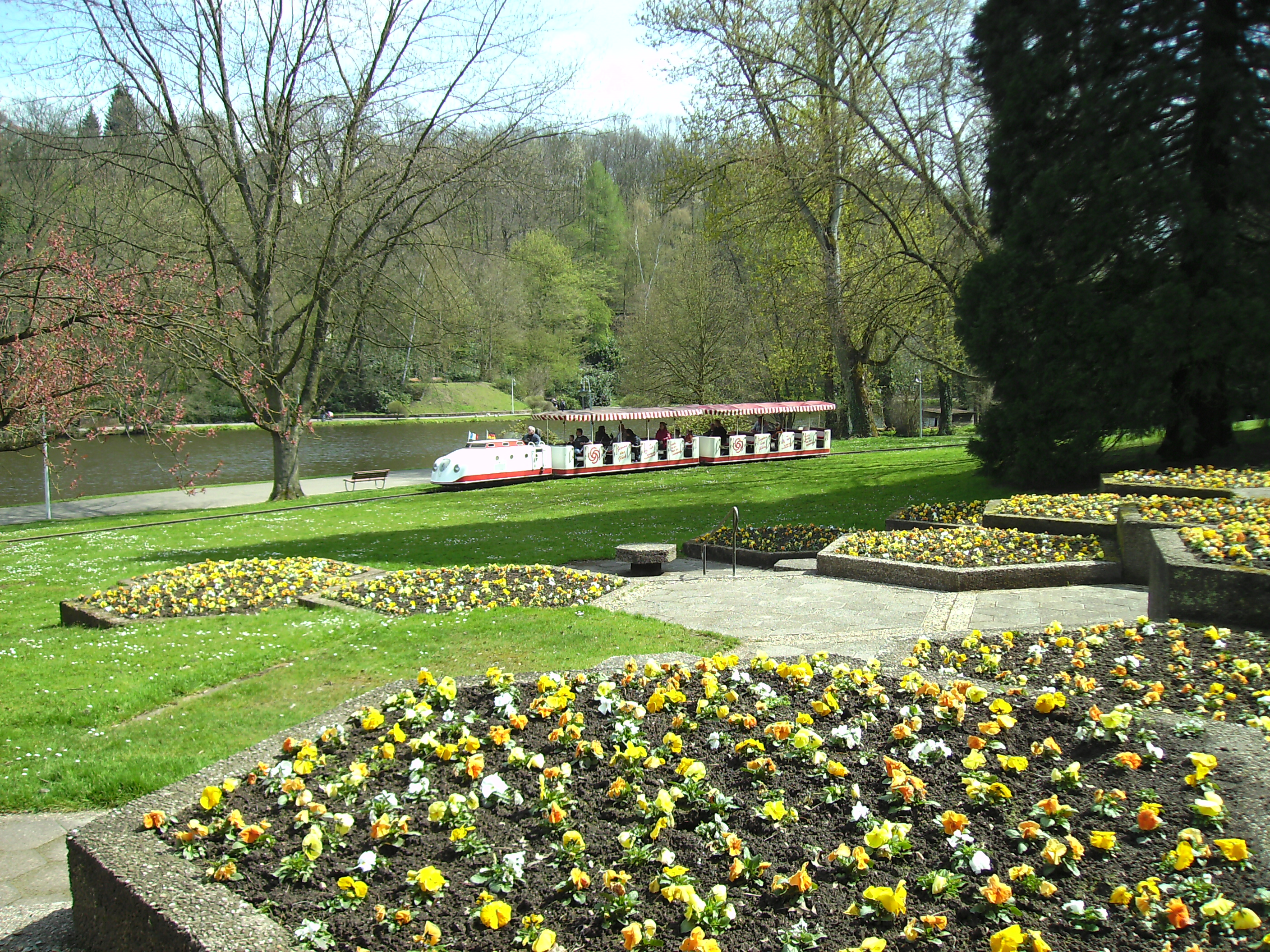 Saarbrücken: Deutsch-Französischer Garten, Parkbahn